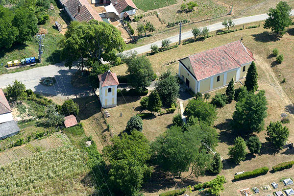 Légi fotó Kisecsetről